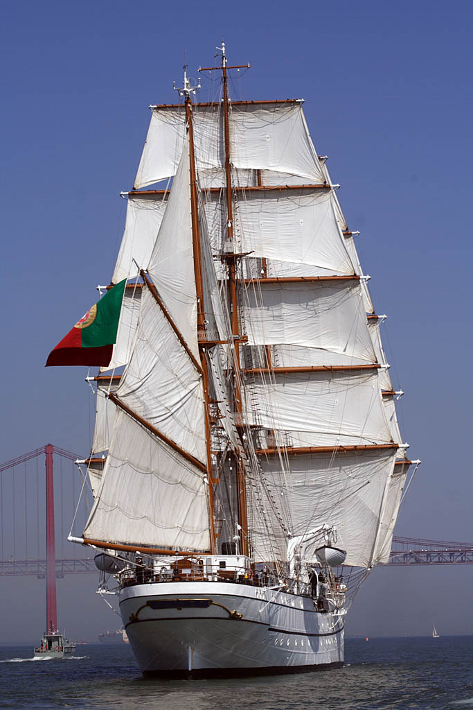 NRP Sagres - na comemoração dos 150 anos da Associação Naval de Lisboa navegando no Tejo.